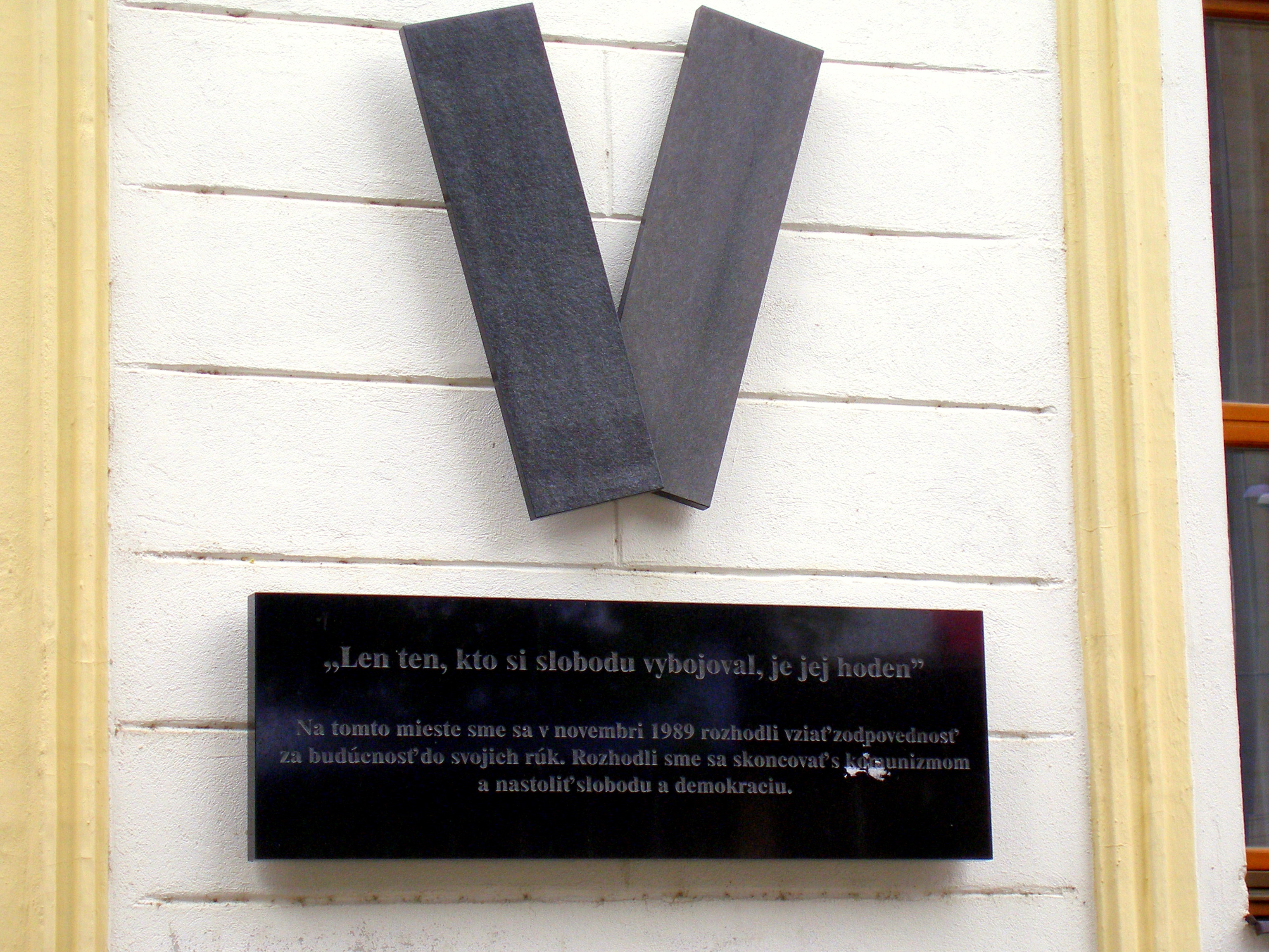 Námestie Slovenského národného povstania (SNP) v Bratislave